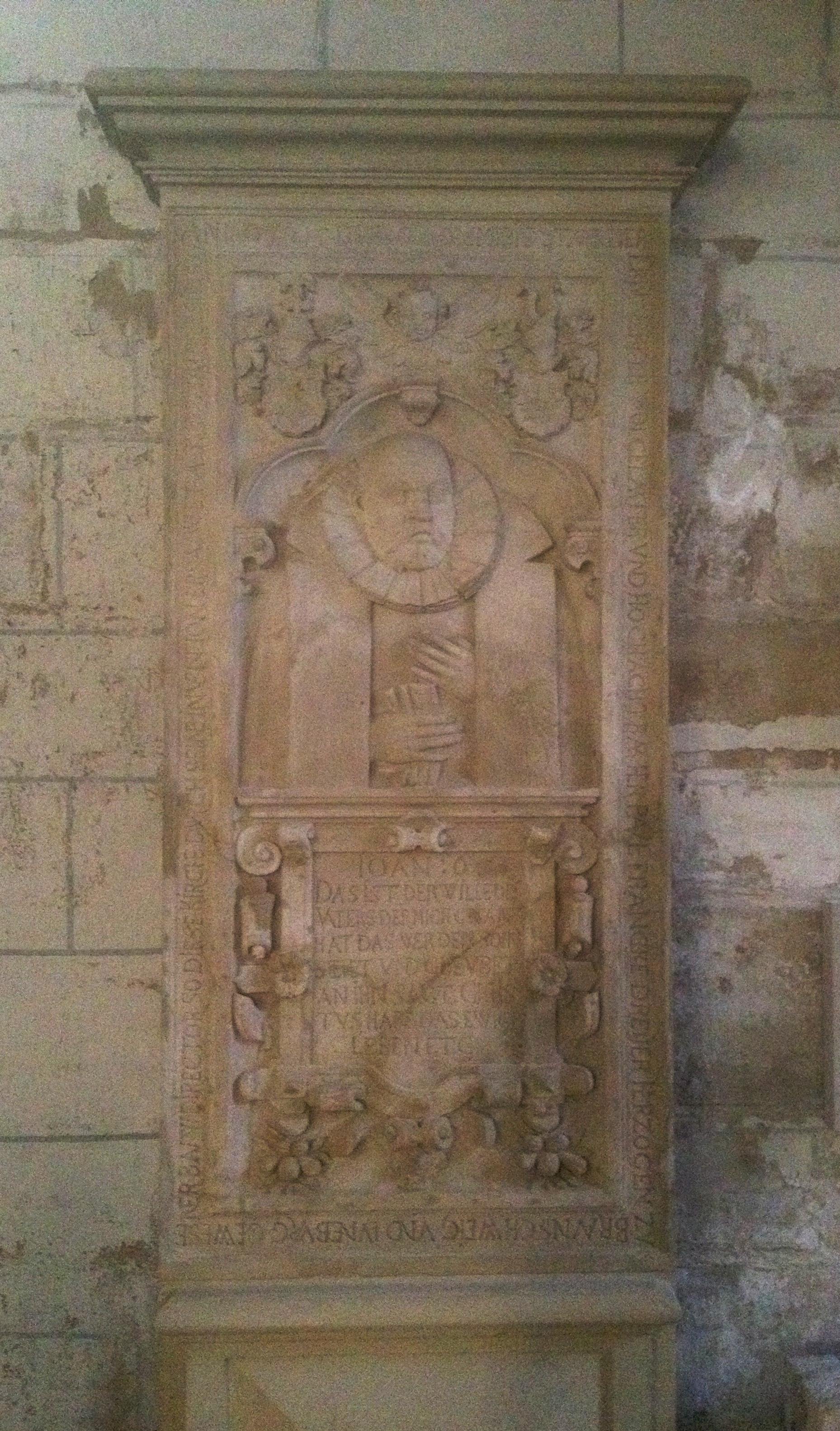 Wolfenbüttel, Hauptkirche Beatae Mariae Virginis, Epitaph des Architekten der Kirche Paul Francke